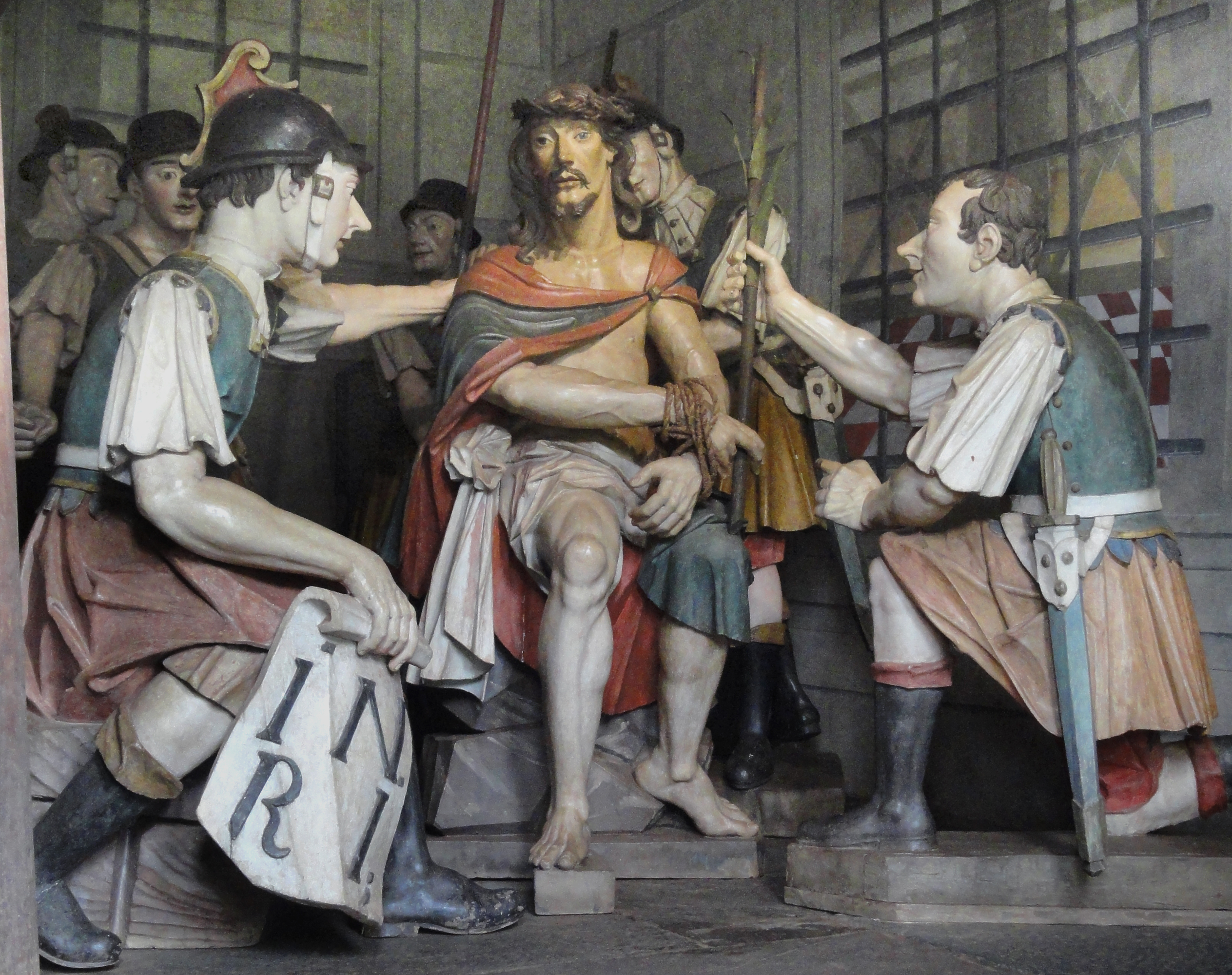 Santuário de Bom Jesus de Matozinhos: conjunto arquitetônico, paisagístico e escultórico. Aleijadinho: Jesus é escarnecido pelos soldados romanos